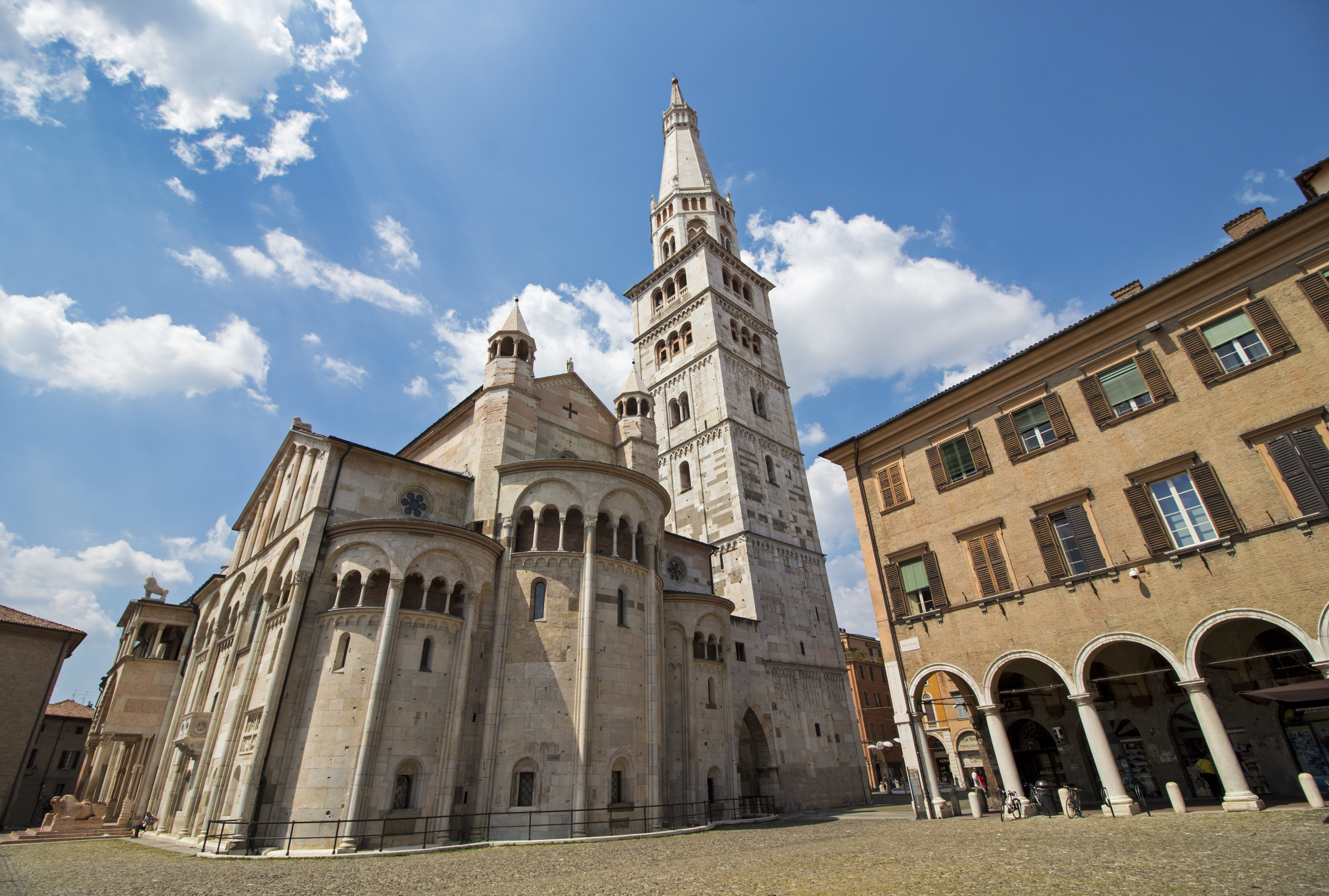 Ghirlandina di Modena This is a photo of a monument which is part of cultural heritage of Italy.